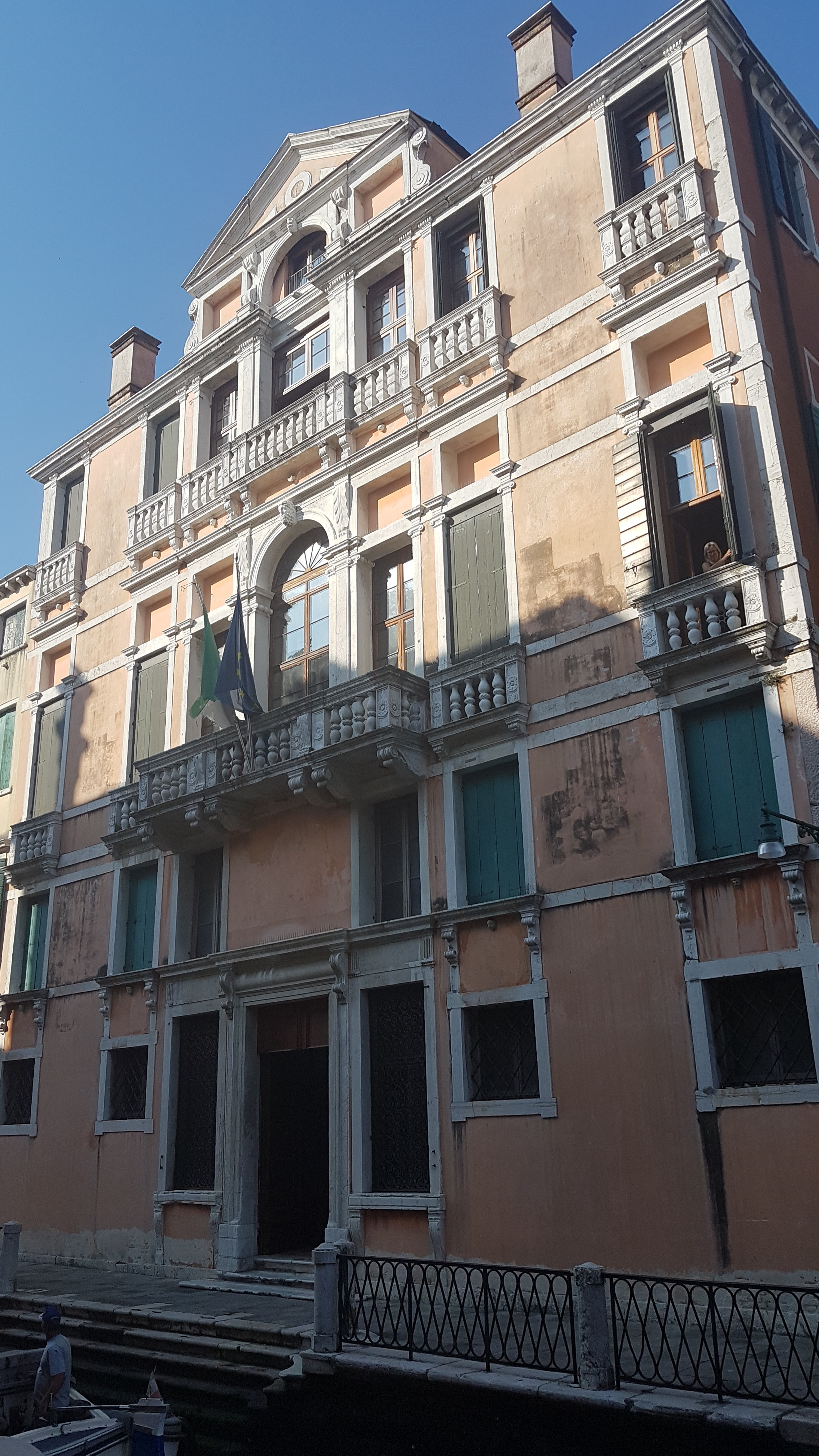 Venedig-Santa Croce, Palazzo Soranzo Cappelo